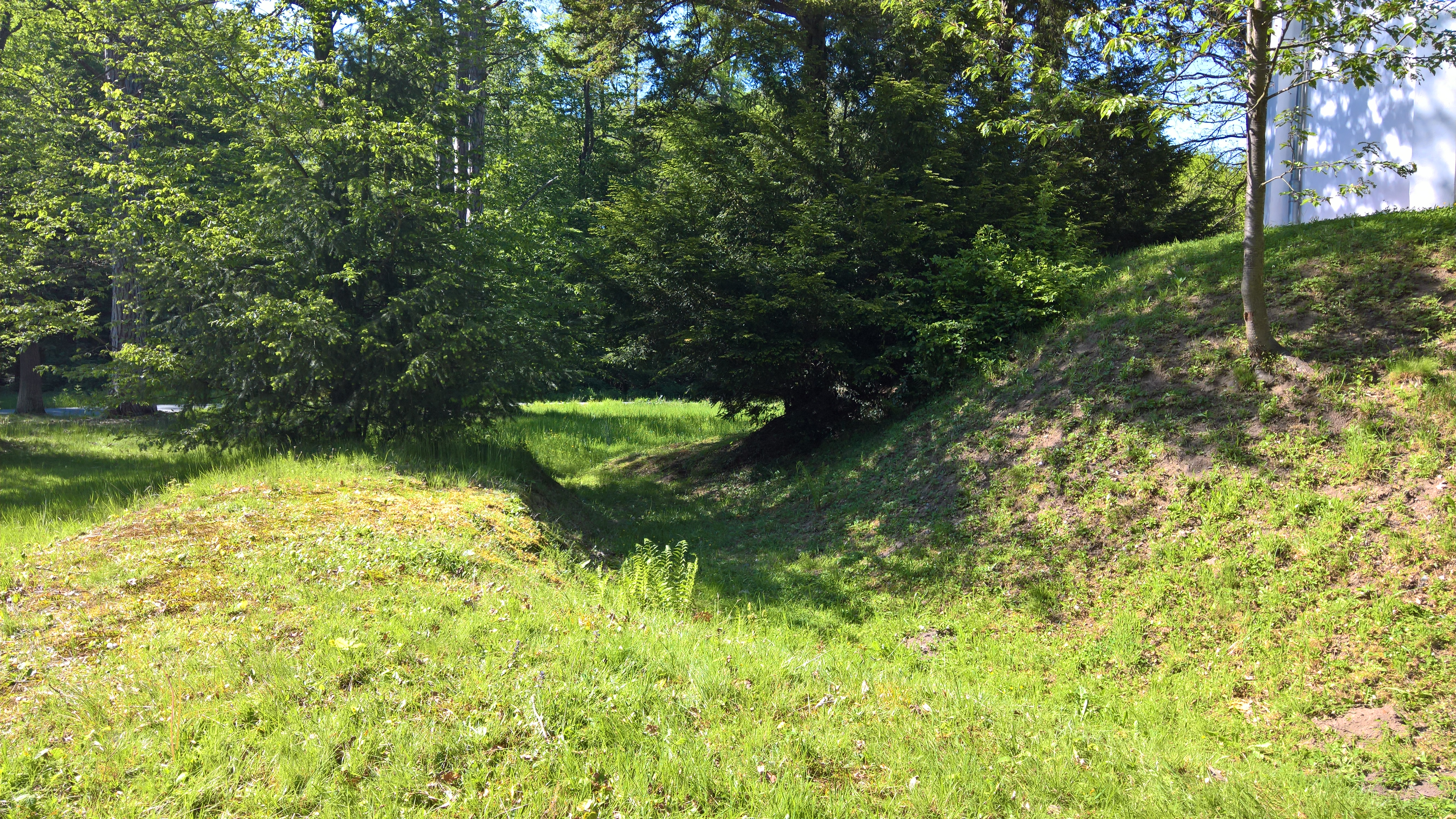 Die Dianaburg, Wall- und Grabenreste des ursprünglichen Jagdschlösschens